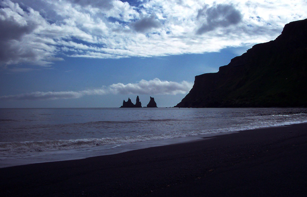 Reynisdrangar